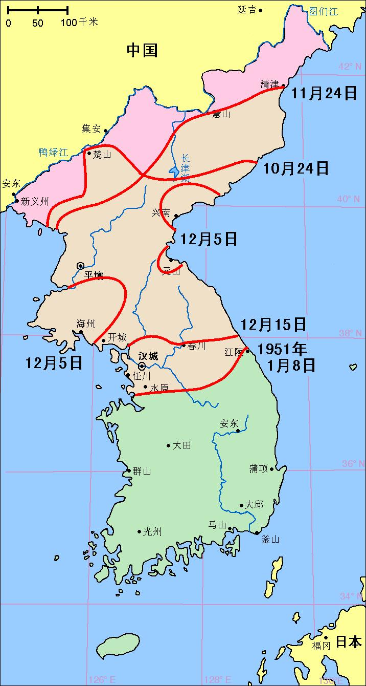 朝鲜战争第三阶段中国人民志愿军进攻形势地图